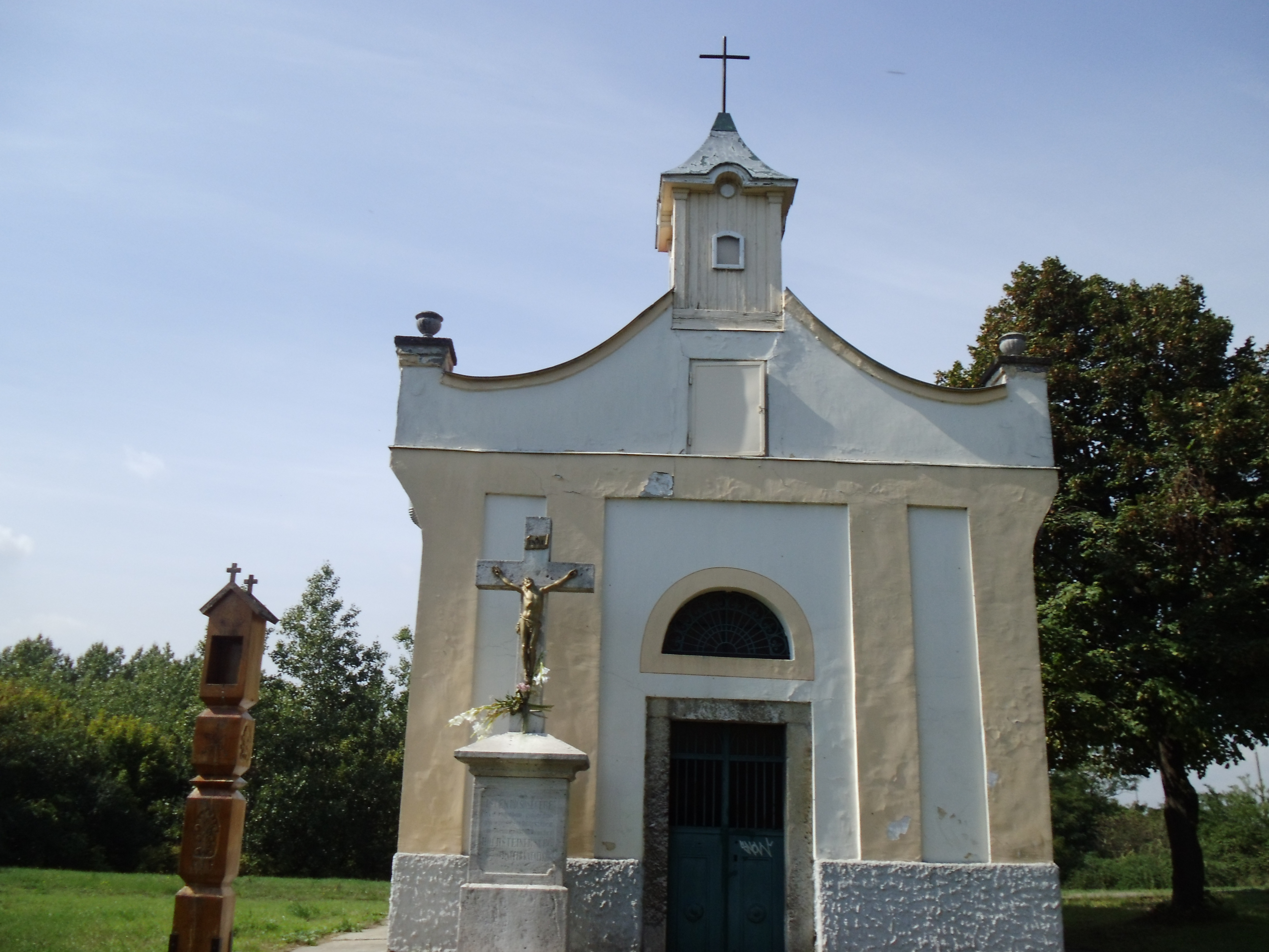 rk. kápolna, 1238 Budapest, XXIII. kerület, Meddőhányó út / Helsinki út This is a photo of a monument in Hungary. Identifier: 1311